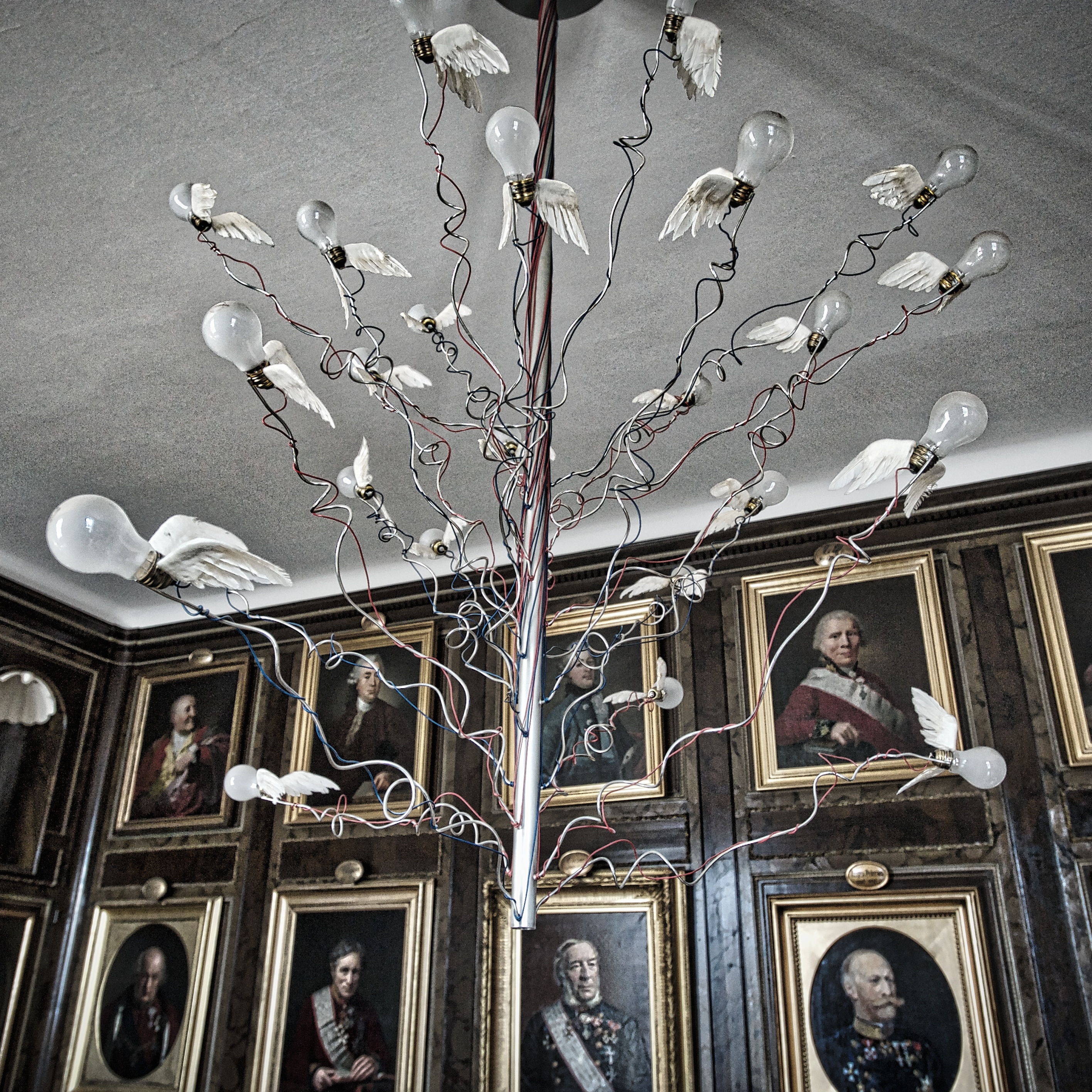 Politidirektørens kontor.